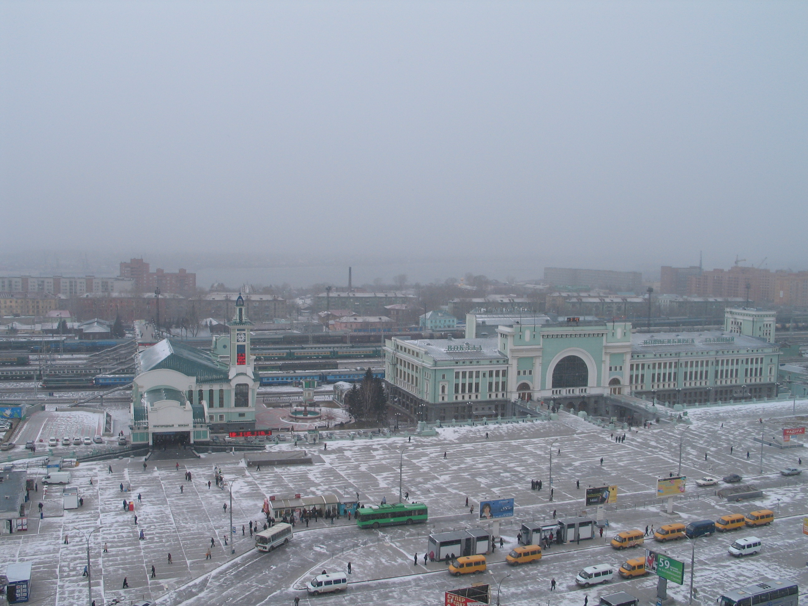 Новосибирский железнодорожный вокзал и площадь Гарина-Михайловского